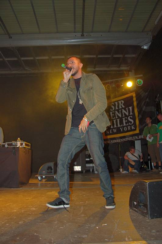 Reggae artist Million Stylez performing at Reggae Jam 2007, Bersenbrück